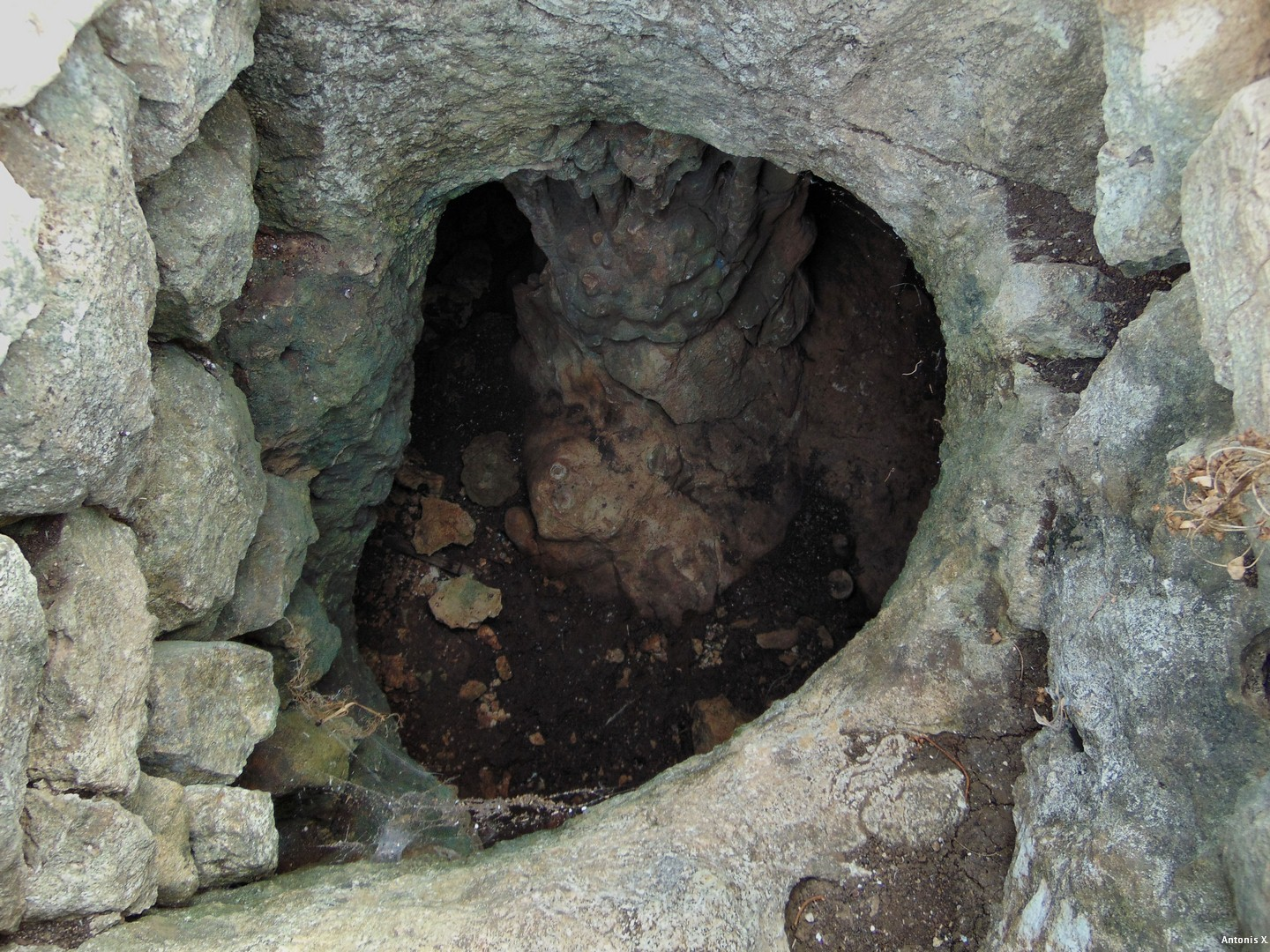 Το σπήλαιο του Κουρνά